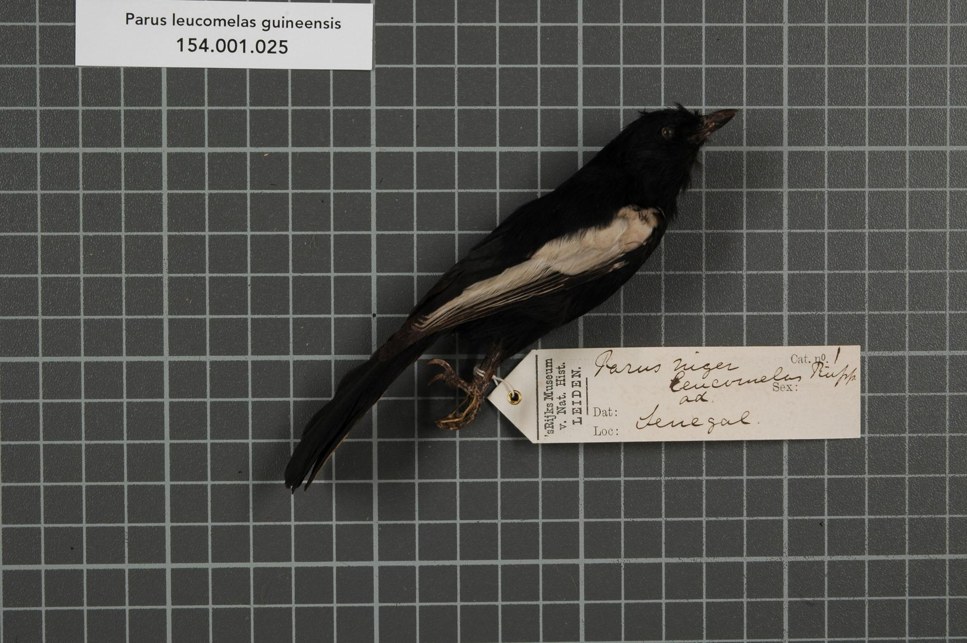 Parus leucomelas guineensis Shelley, 1900